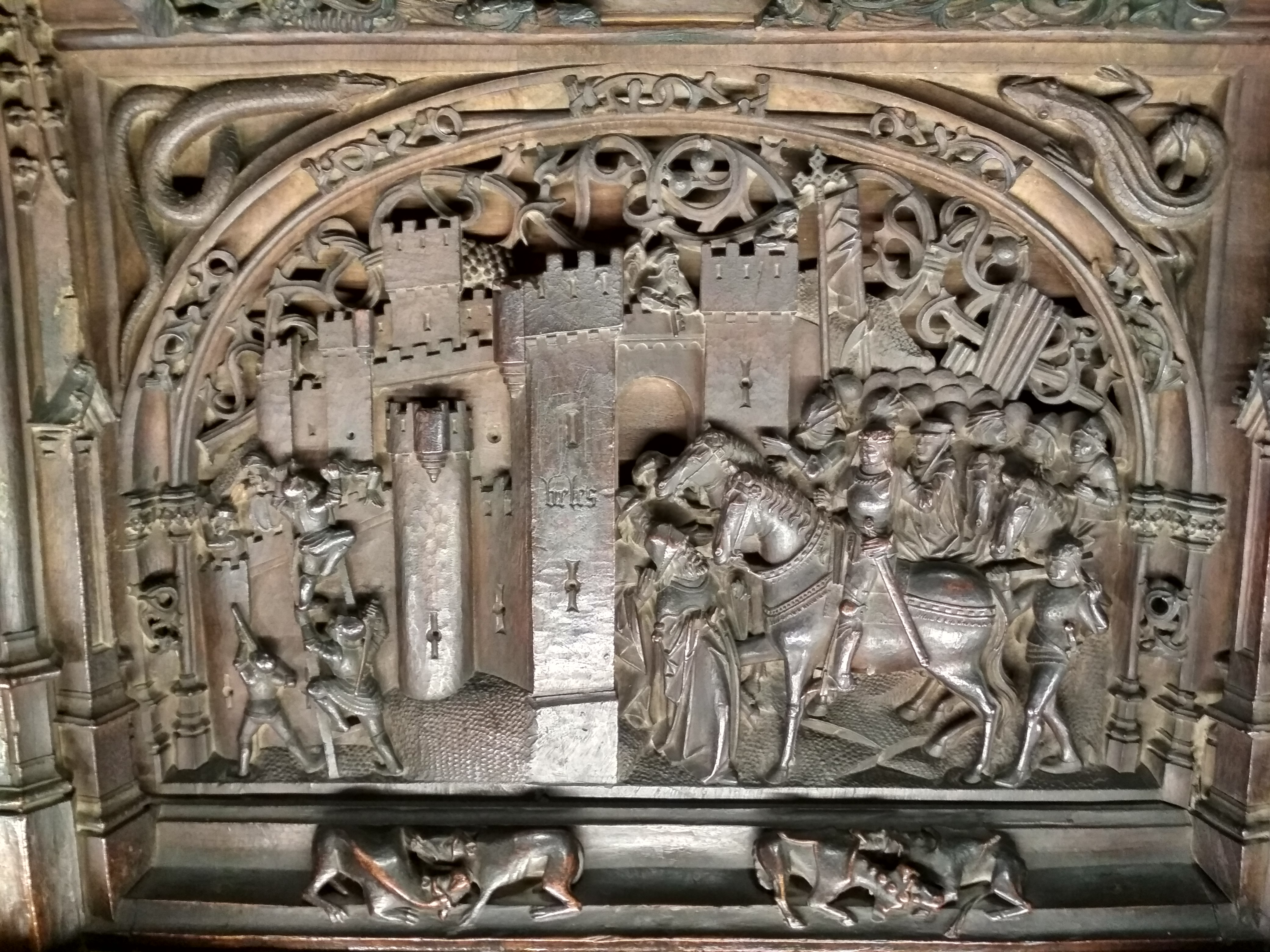 Toma de Vélez-Málaga, tallada en la sillería baja del coro de la Catedral de Toledo